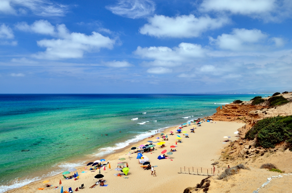 Scivu